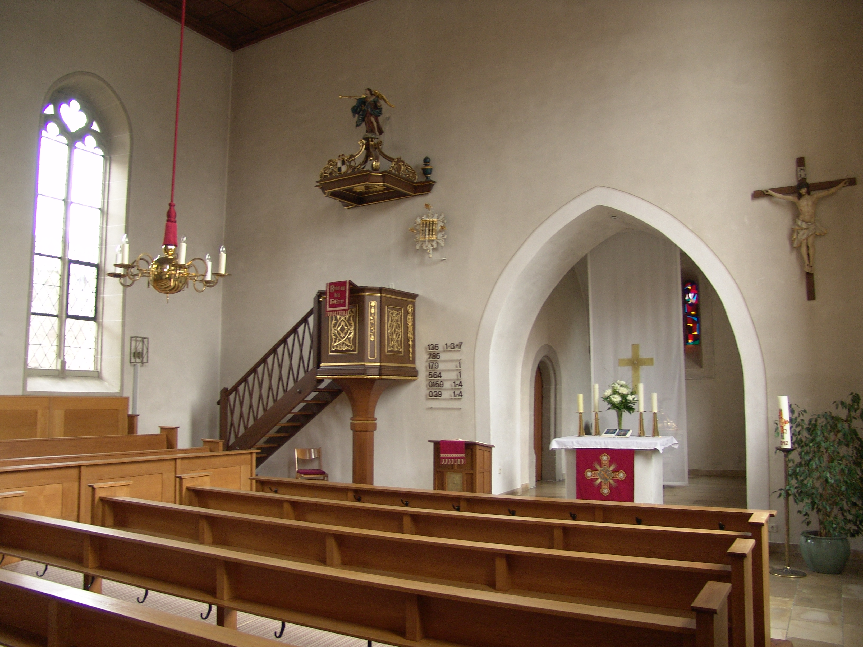 evang.-luth. Kirche St. Martin in Segnitz